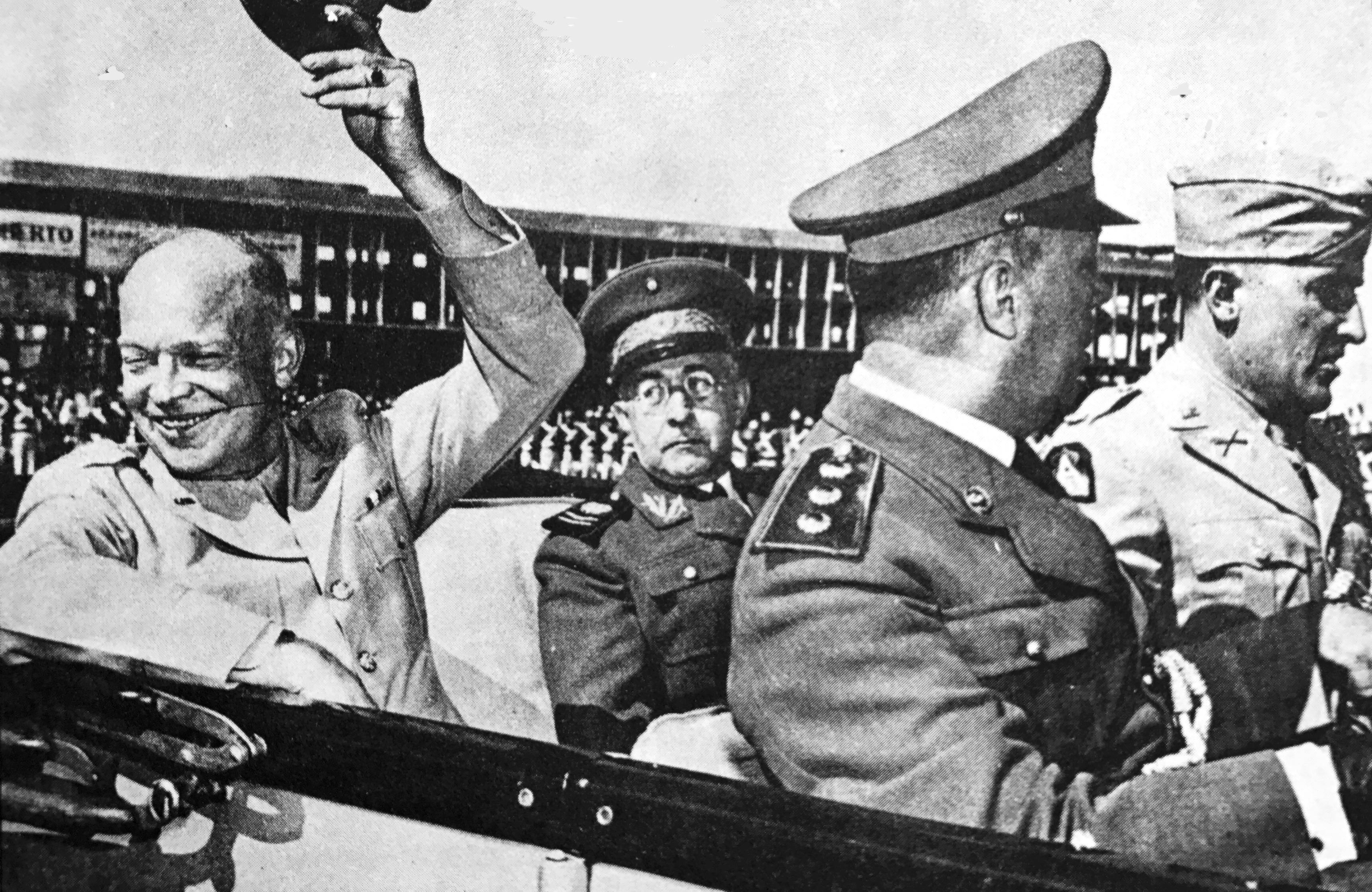 Mascarenhas de Moraes insieme al generale Dwight G. Eisenhower, quando dalla sua visita in Brasile (archivio di D. Martha Mascarenhas de Moraes, Revista do Exército Brasileiro, Biblioteca do Exército, Rio de Janeiro, v. 120, n°4, outubro/novembro 1983, pg. 254)